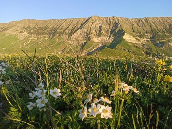 Гендаргной-лам